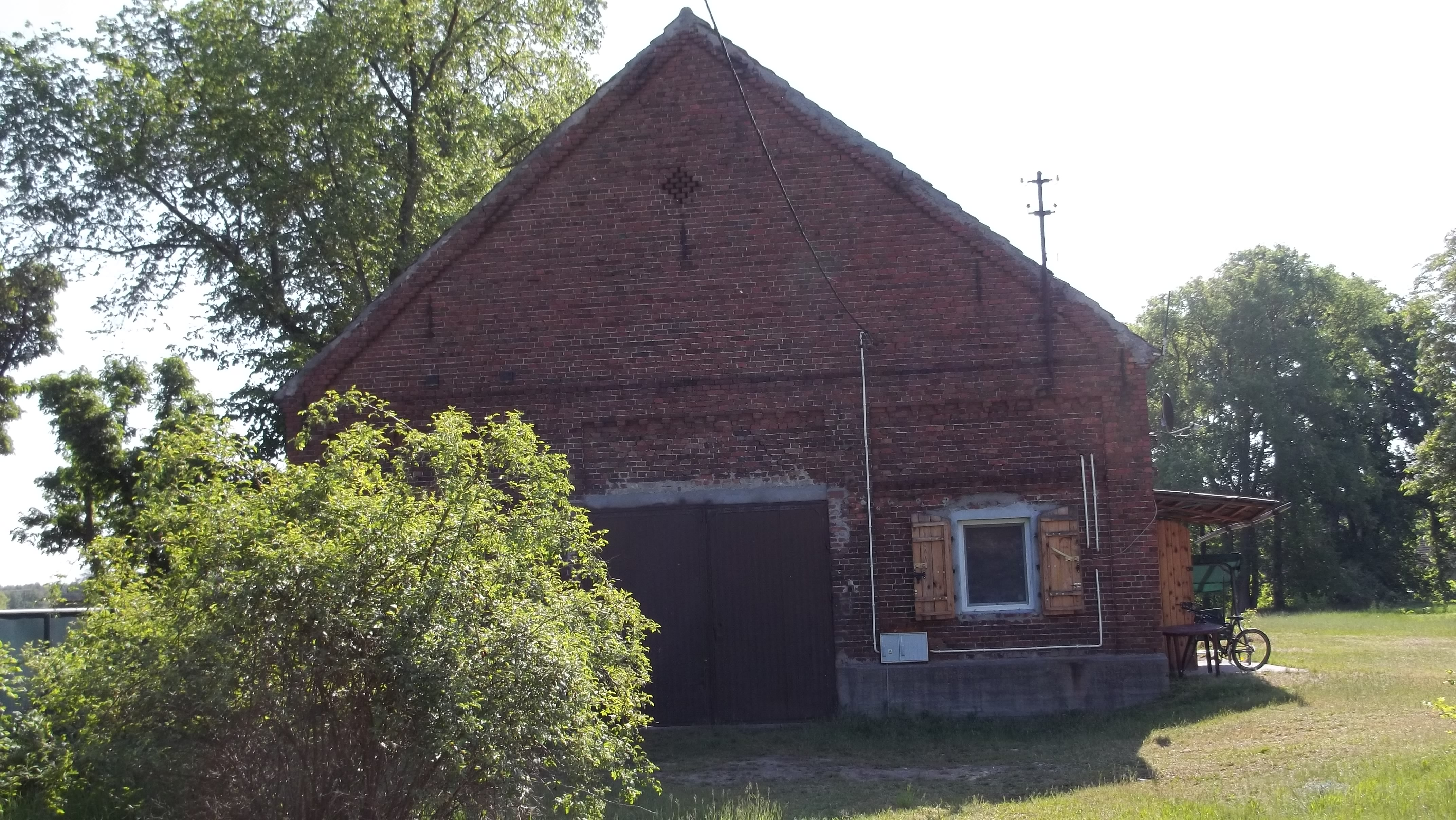 Owczarnia.